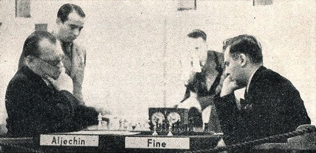 Partij Aljechin - Fine. AVRO 1938